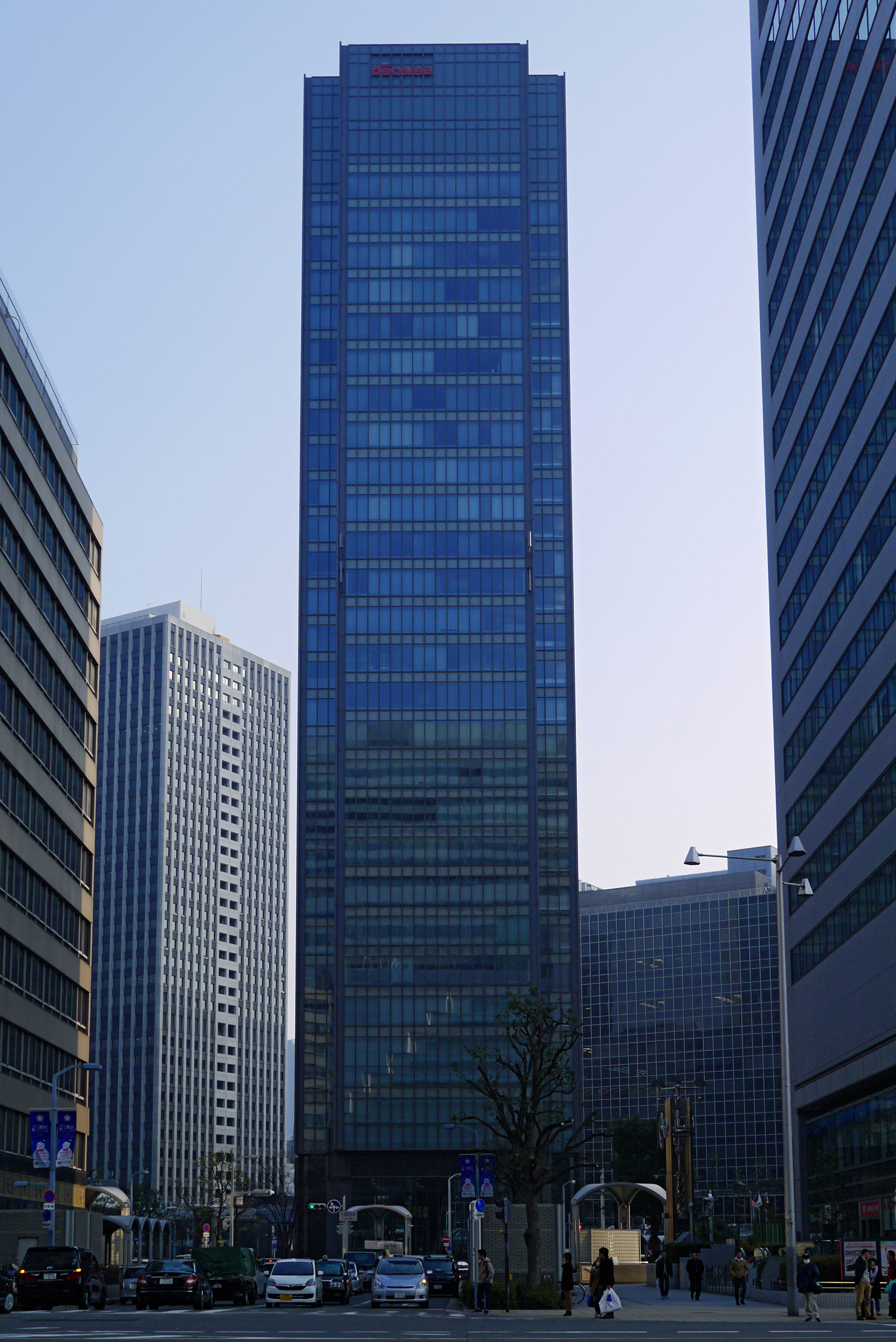 Umeda DT Tower (梅田DTタワー), Osaka, Osaka prefecture, Japan